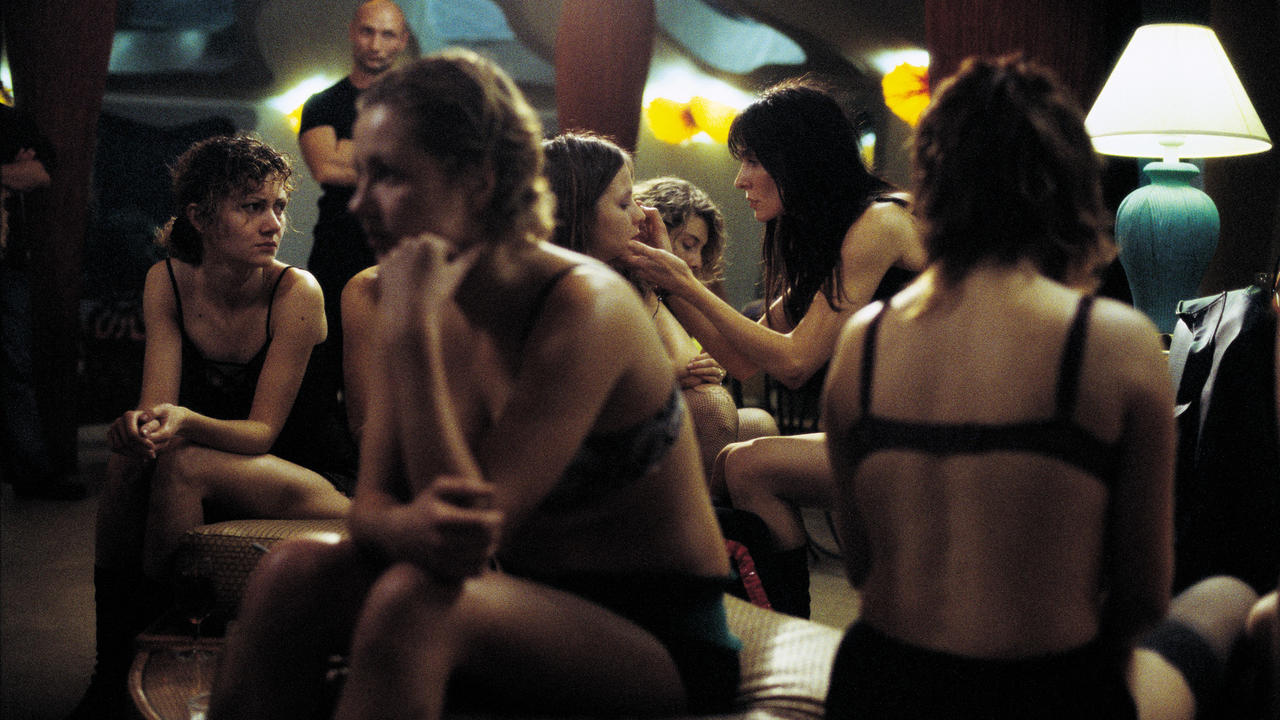 מתוך סרטו של עמוס גיתאי הארץ המובטחת